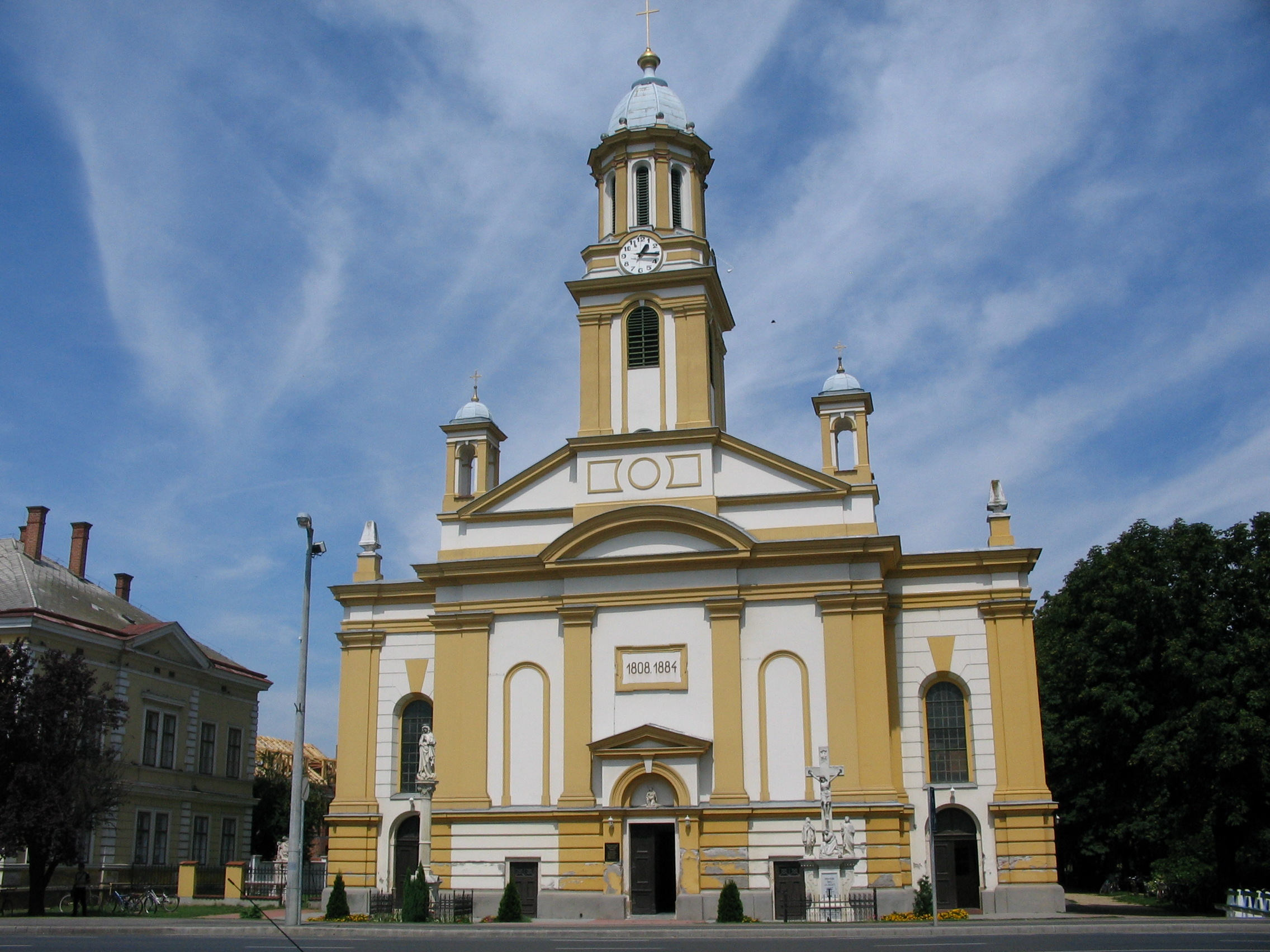 Szent Anna rk. templom Kapuváron This is a photo of a monument in Hungary, Identifier: 4484